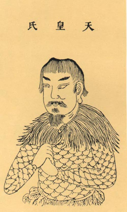 神话传说中的远古三皇之一。